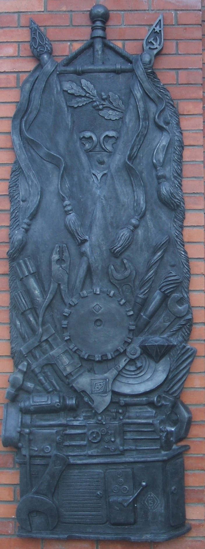 Сестрорецк СПб Памятнрик последнему рабочему завода СИЗ Боковые сетелы